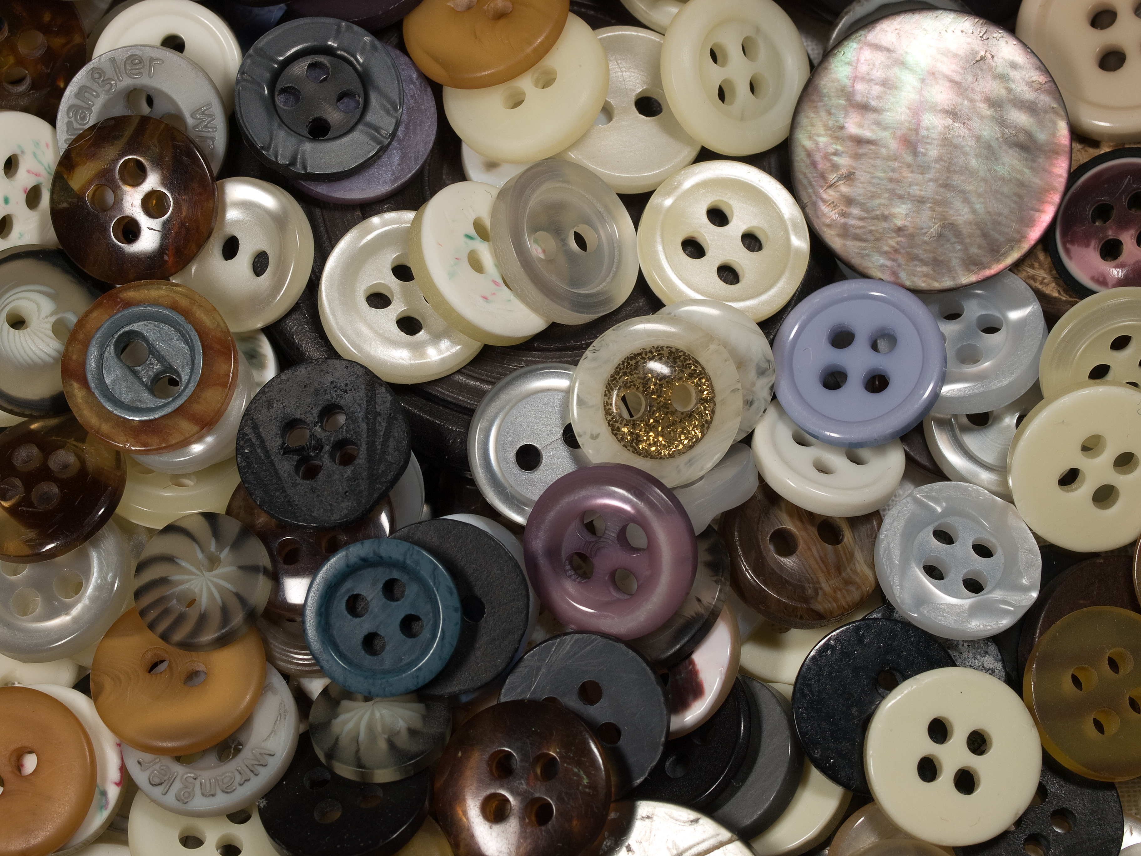 Knöpfe, Buttons